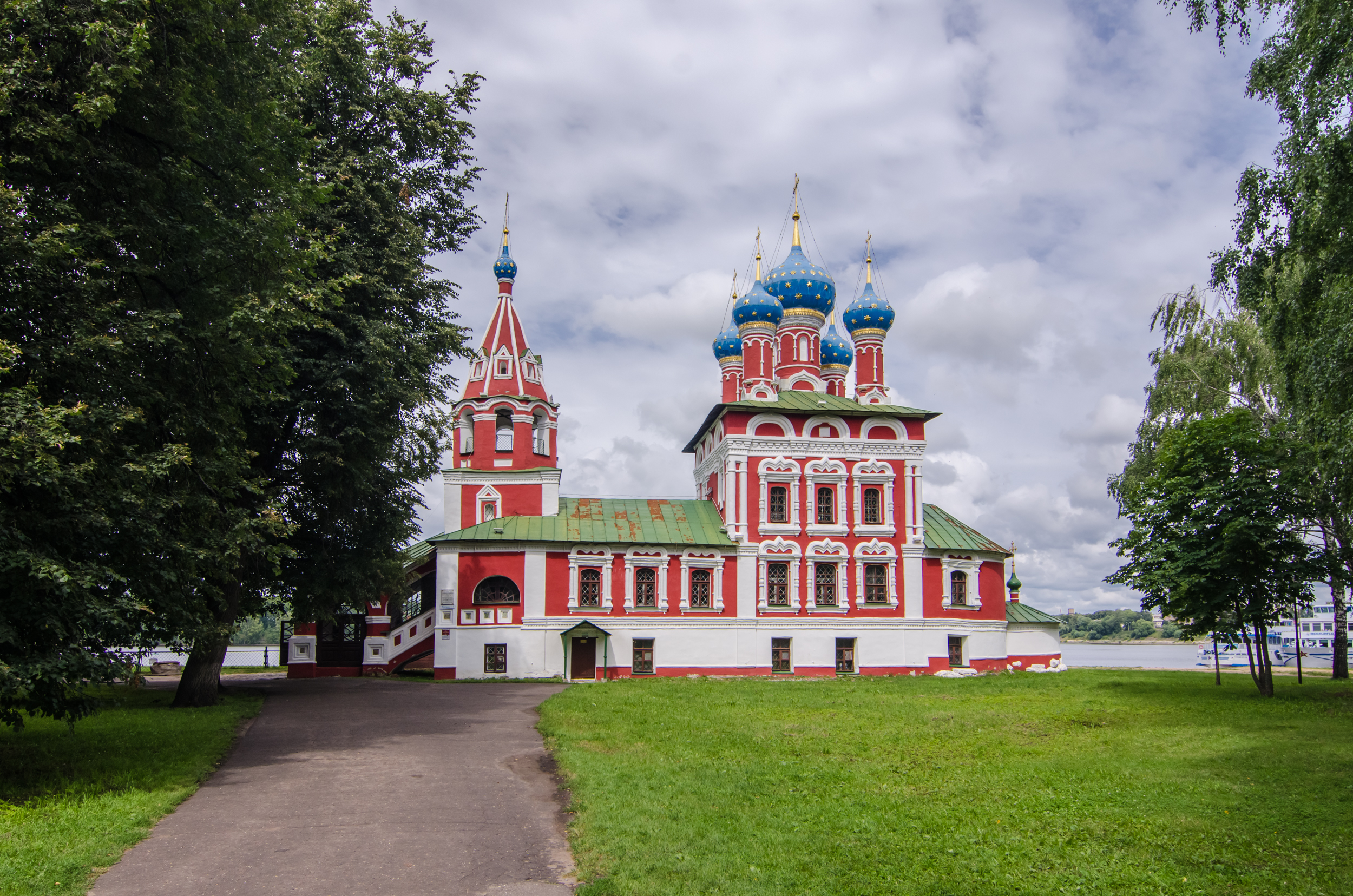 Церковь царевича Димитрия на крови: улица Кремль, 3, Углич, Ярославская область